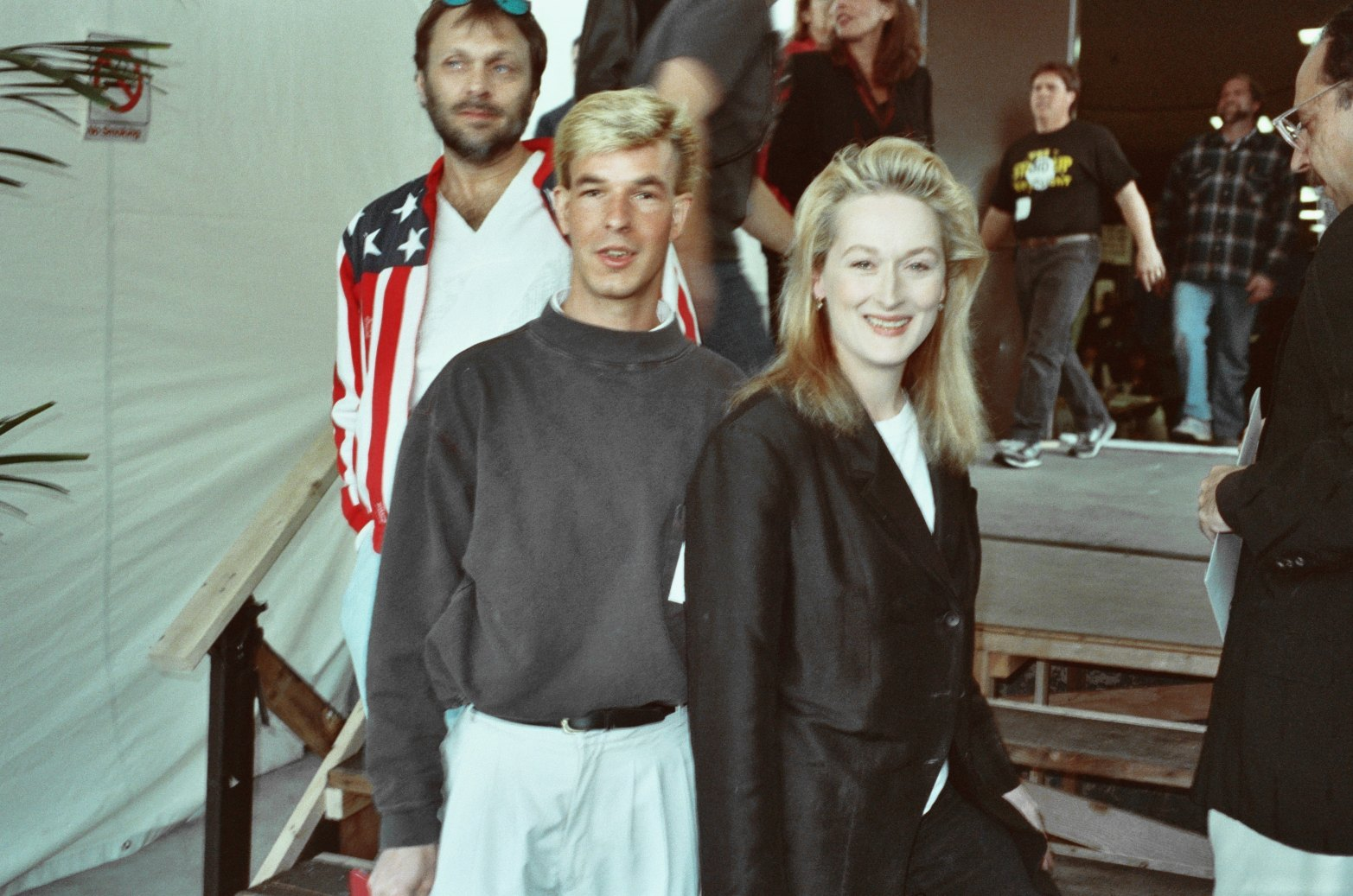 La actriz estadounidense y ganadora de dos Óscar, Meryl Streep en la entrega de los premios Grammy en 1990.